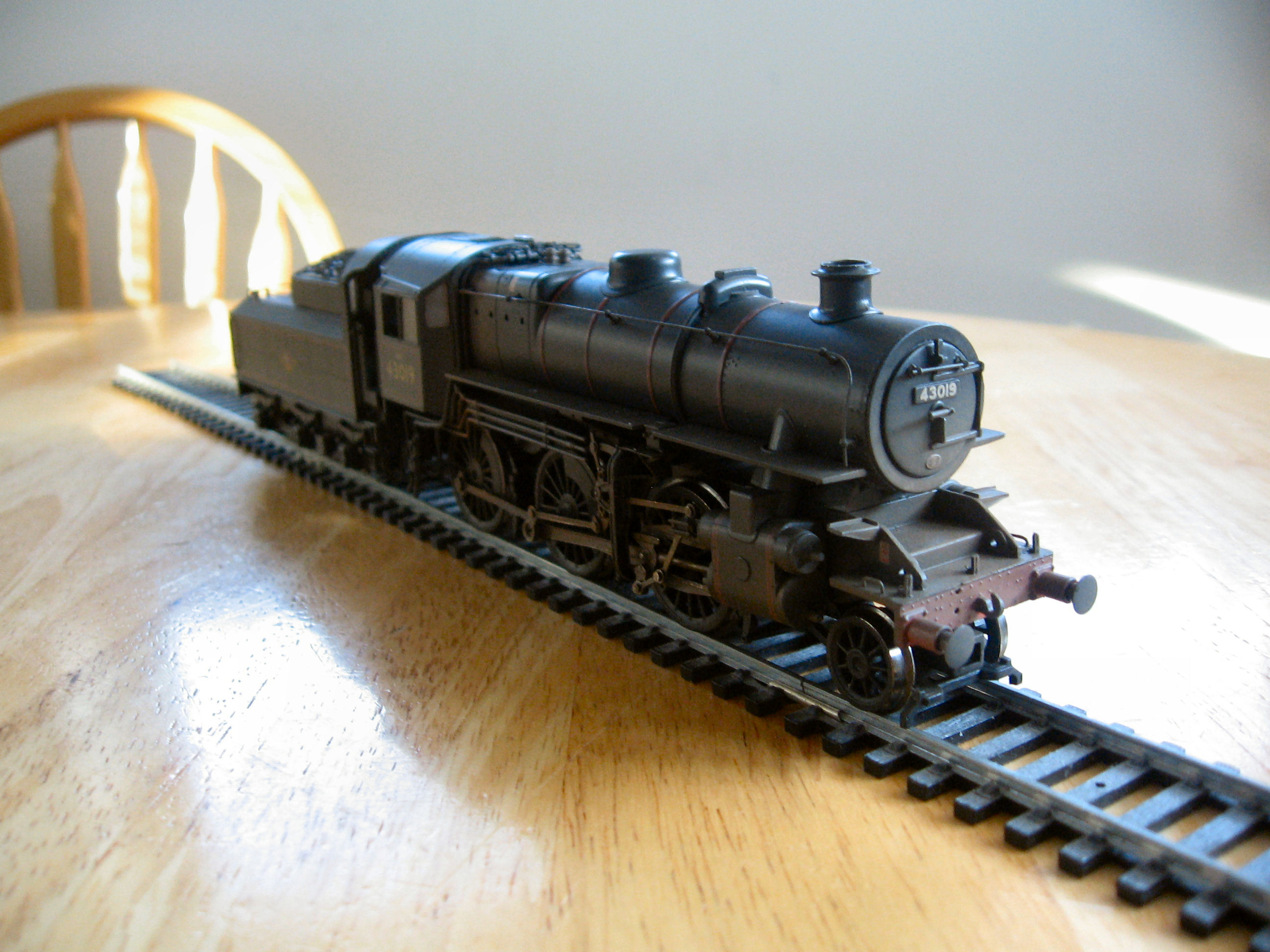 Ivatt Class 4 (2)